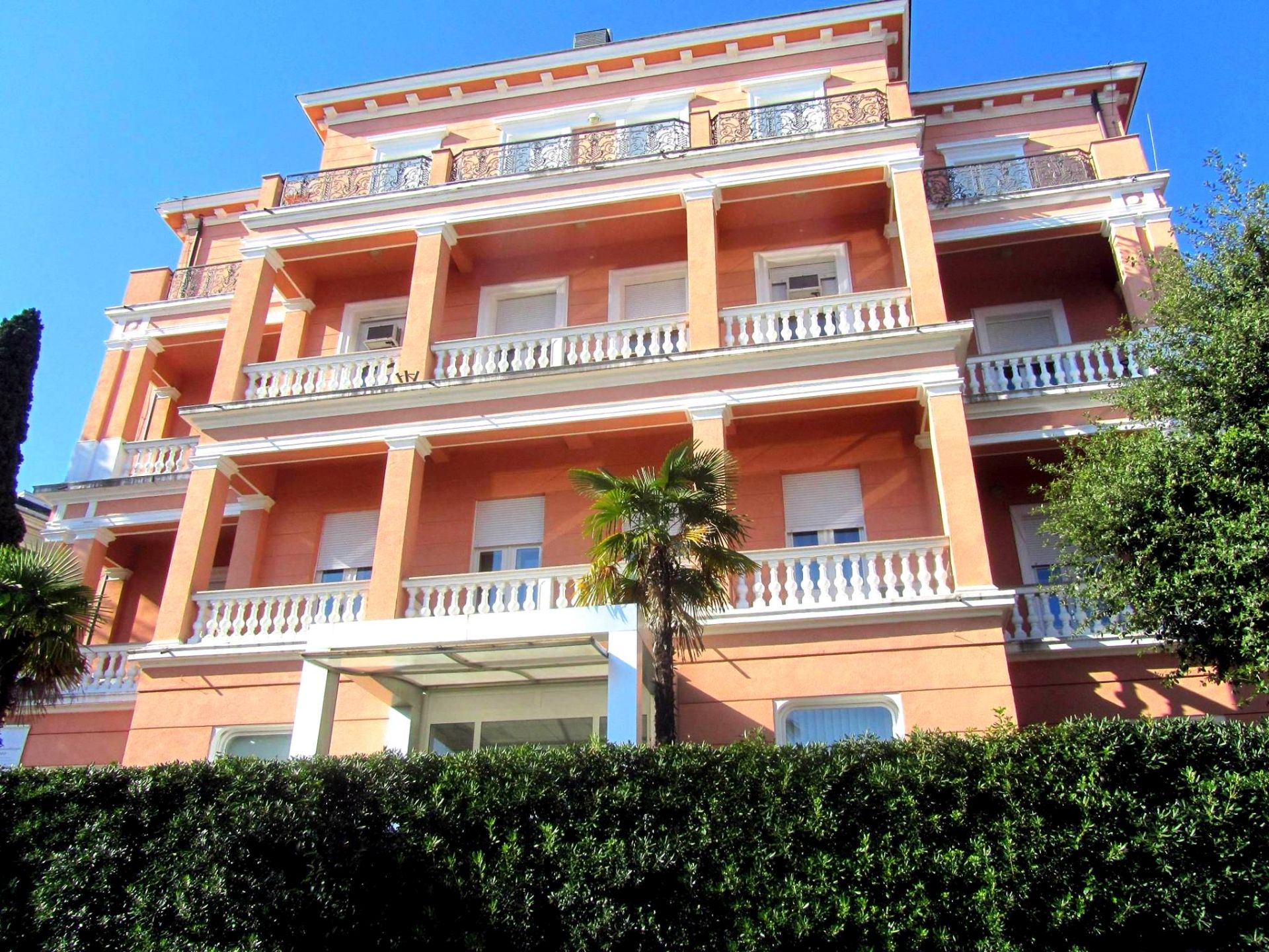 THALASSOTHERAPIA, Opatija